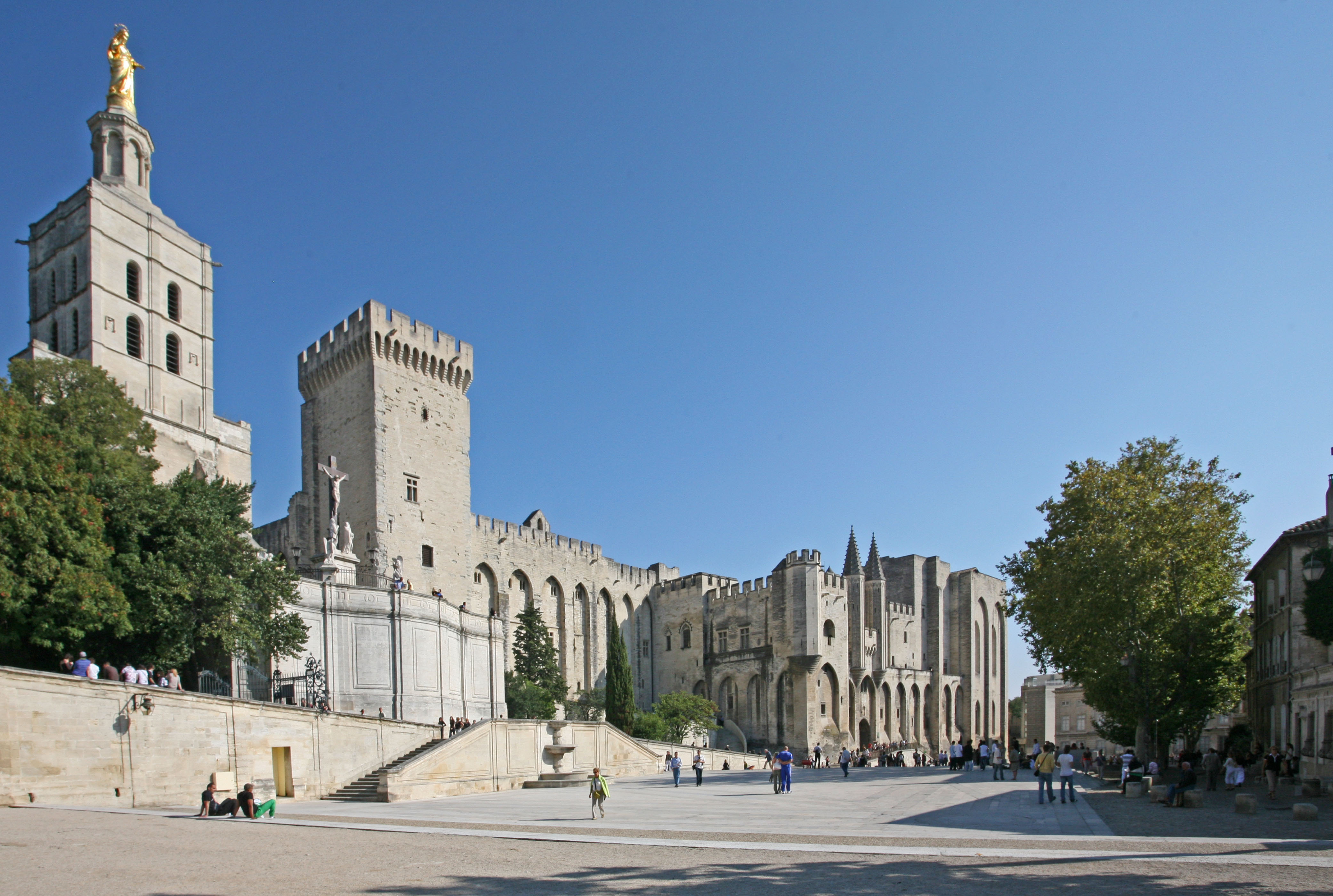 Avignon, Palais des Papes depuis la place devant le petit Palais